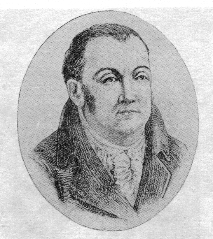 Портрет графа Винцента Тышкевича